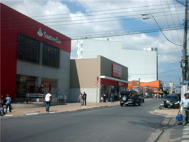 Imagem de Poá